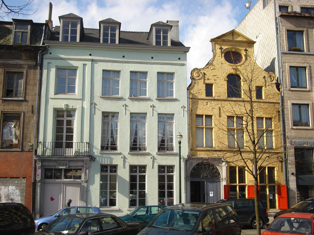 Quai au Bois de Construction 4-5, Brussels